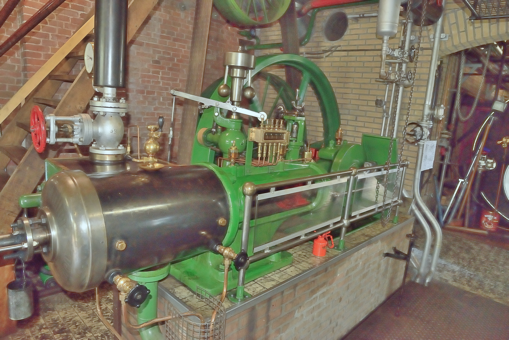 De Wachter, Zuidlaren, stoommachine